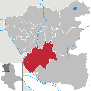 Lage von Klötze im Altmarkkreis Salzwedel